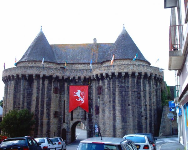 Porte Broërec, appelée aussi Porte Prison .